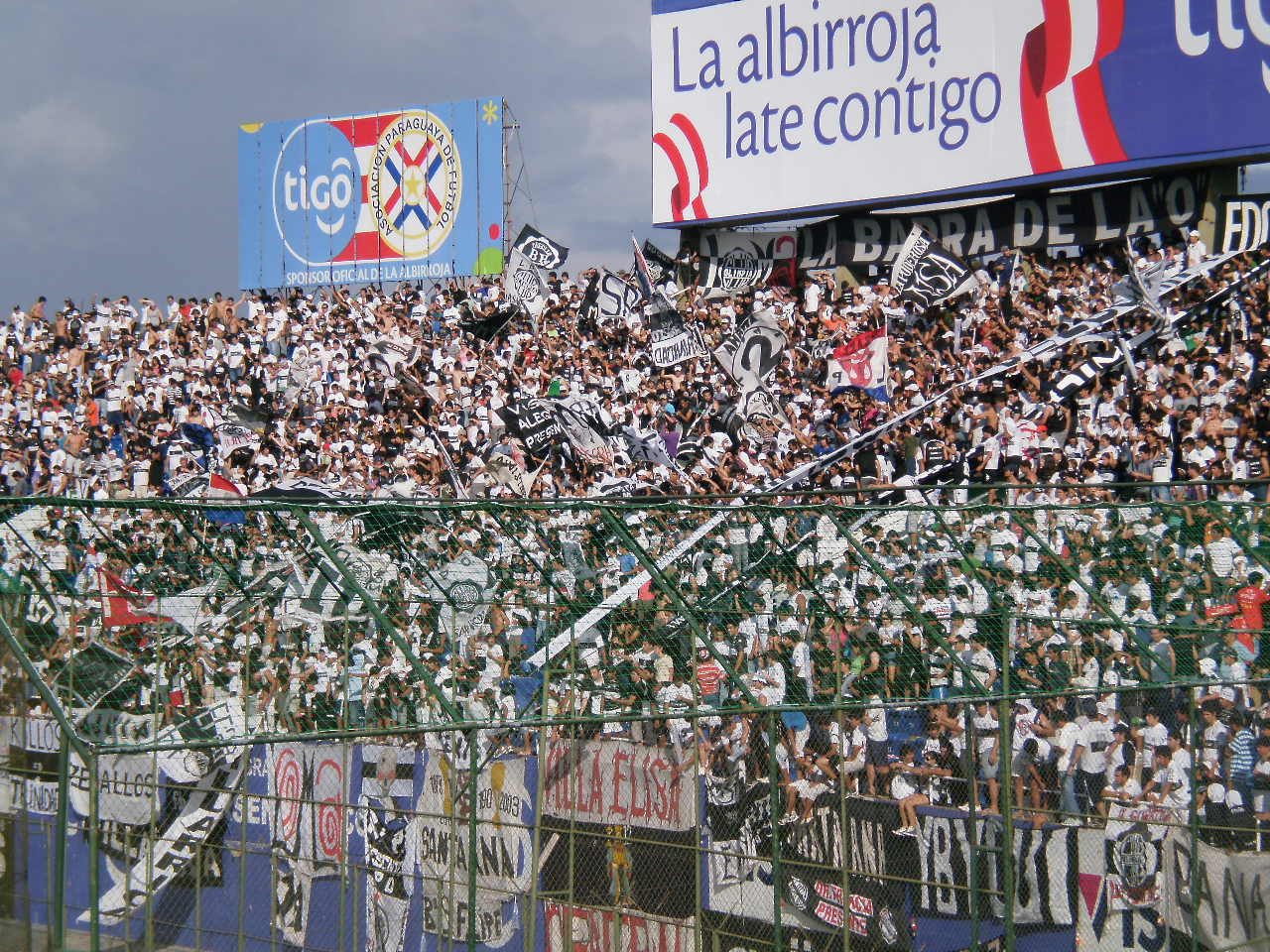 Hinchada de Olimpia de Paraguay sobre el sector sur del estadio Defensores del Chaco durante el partido entre su equipo y el 3 de Febrero, que ganó el primero por 3:1, en el marco de la fecha #11 del torneo Apertura paraguayo.